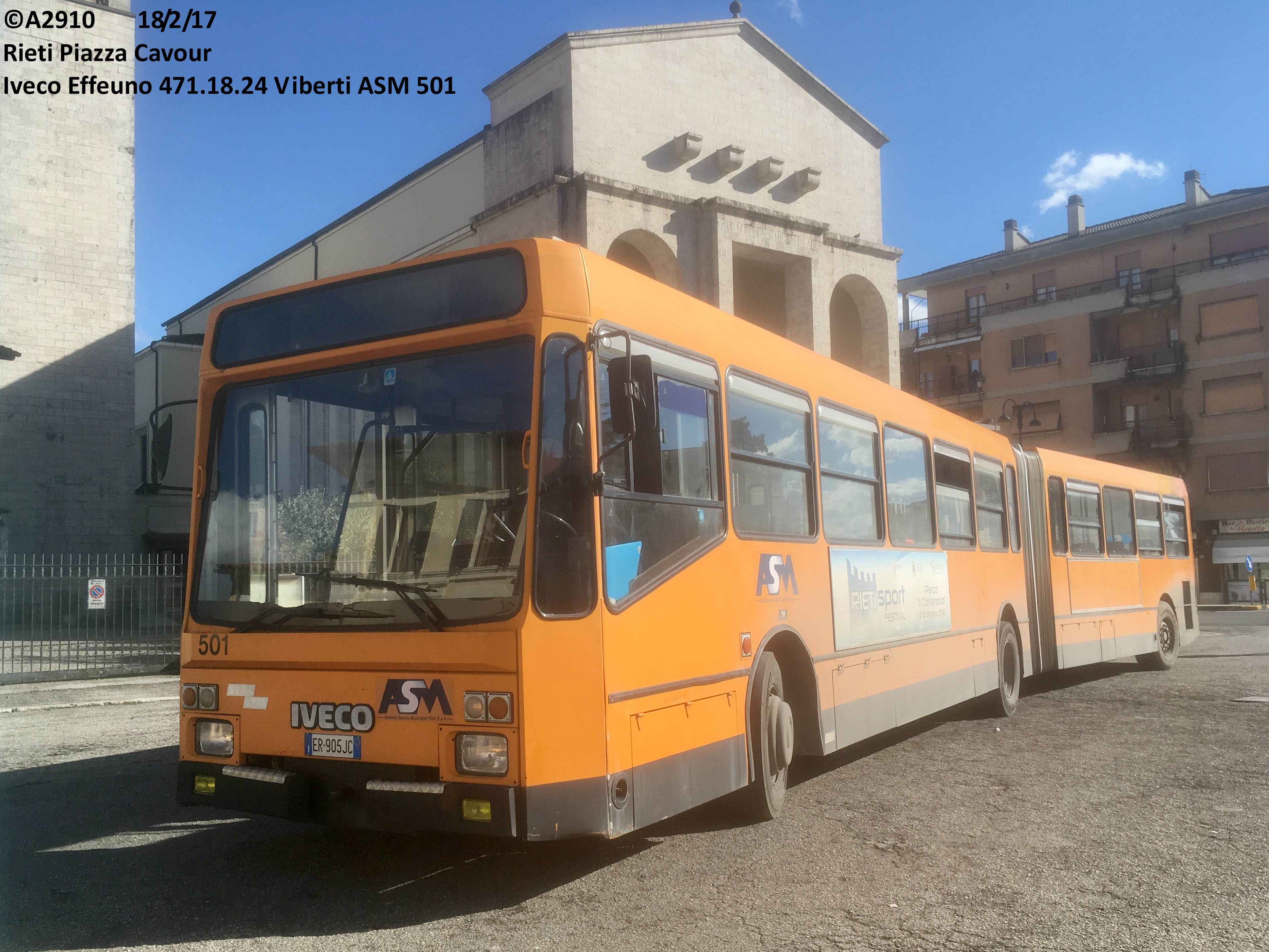 Iveco Effeuno 471.18.24 Viberti di ASM Rieti matricola 501